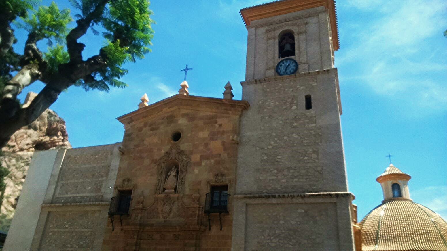 Iglesia de San Lázaro (Alhama). Frontal.